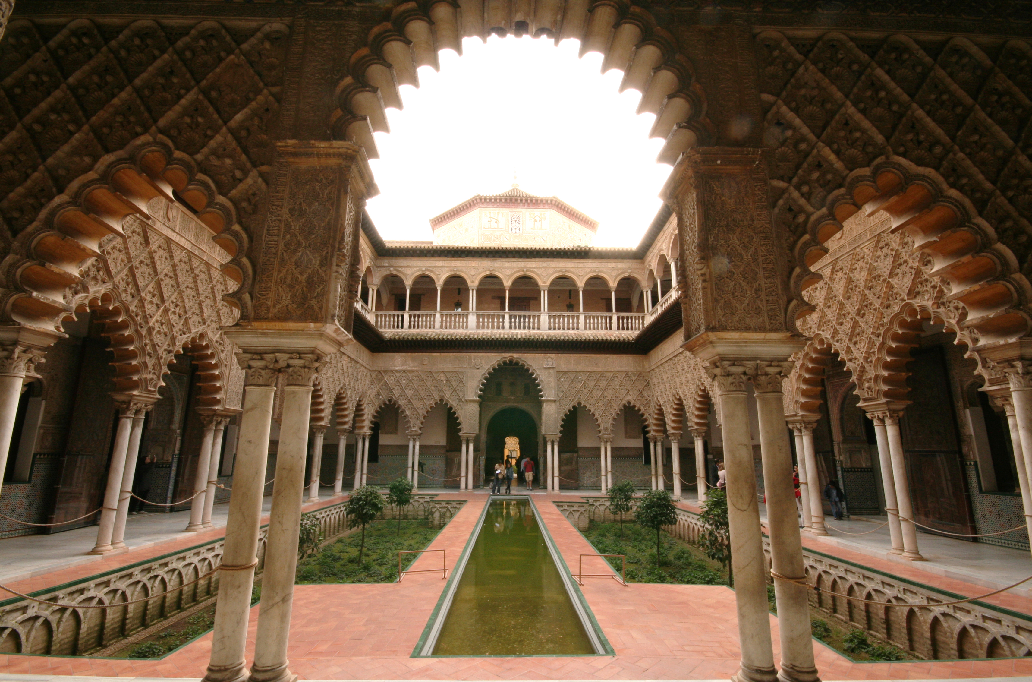 En el Real Alcázar de Sevilla. Más Mudéjar, columnas, arcos lobulados, escritura cúfica, agua, simetría, simplemente precioso. --- In the Real Alcázar, in Seville. More Mudejar style, columns, cusped arches, Kufic script, water, symmetry, simply beautiful.